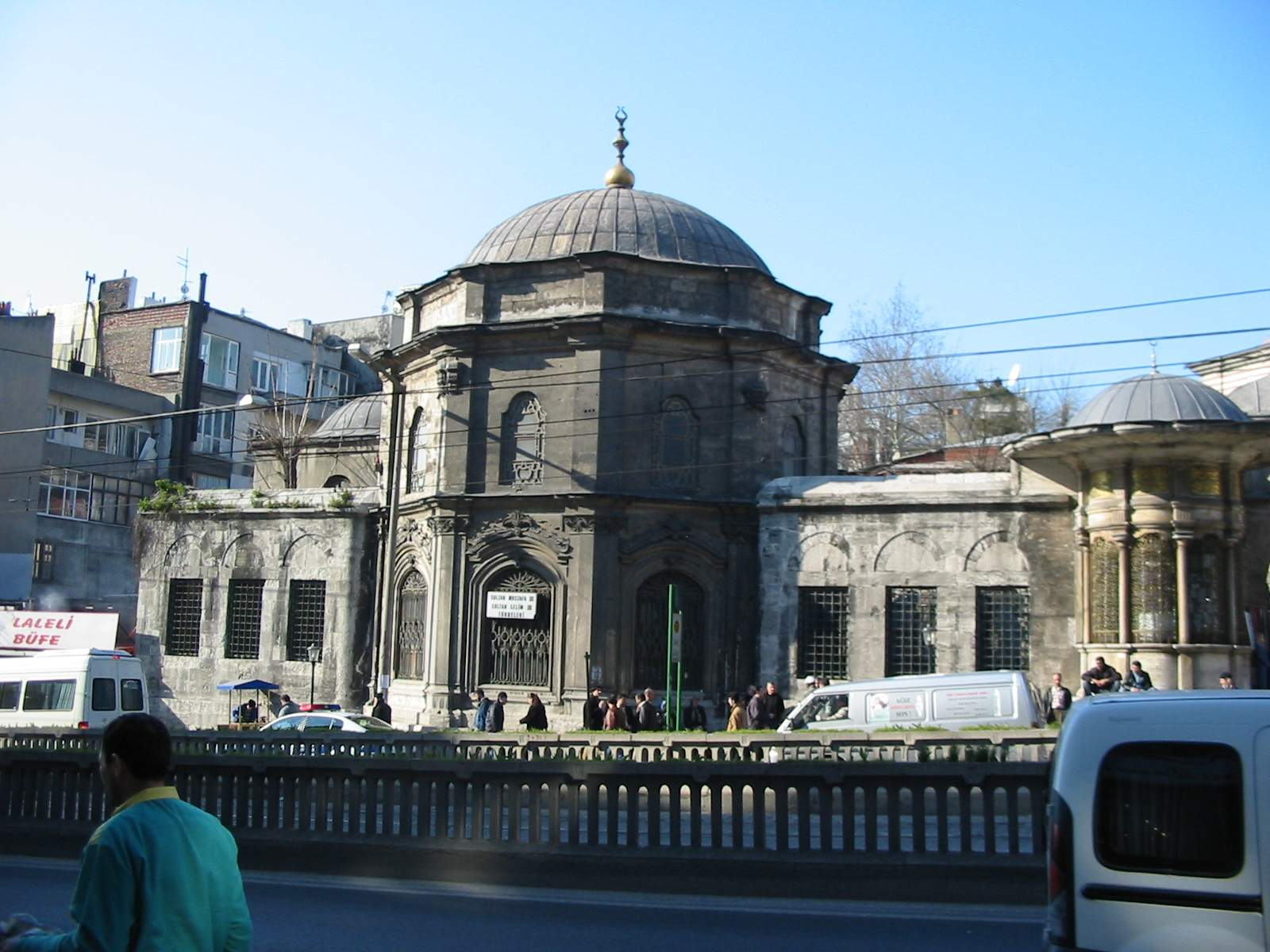 Laleli III.Mustafa Türbesi Ordu Caddesi fotoğrafı 2005 Şubat ayında Bilgen Haliloğlu (ben) tarafından çekilmiştir. Kategori:İstanbul resimleri